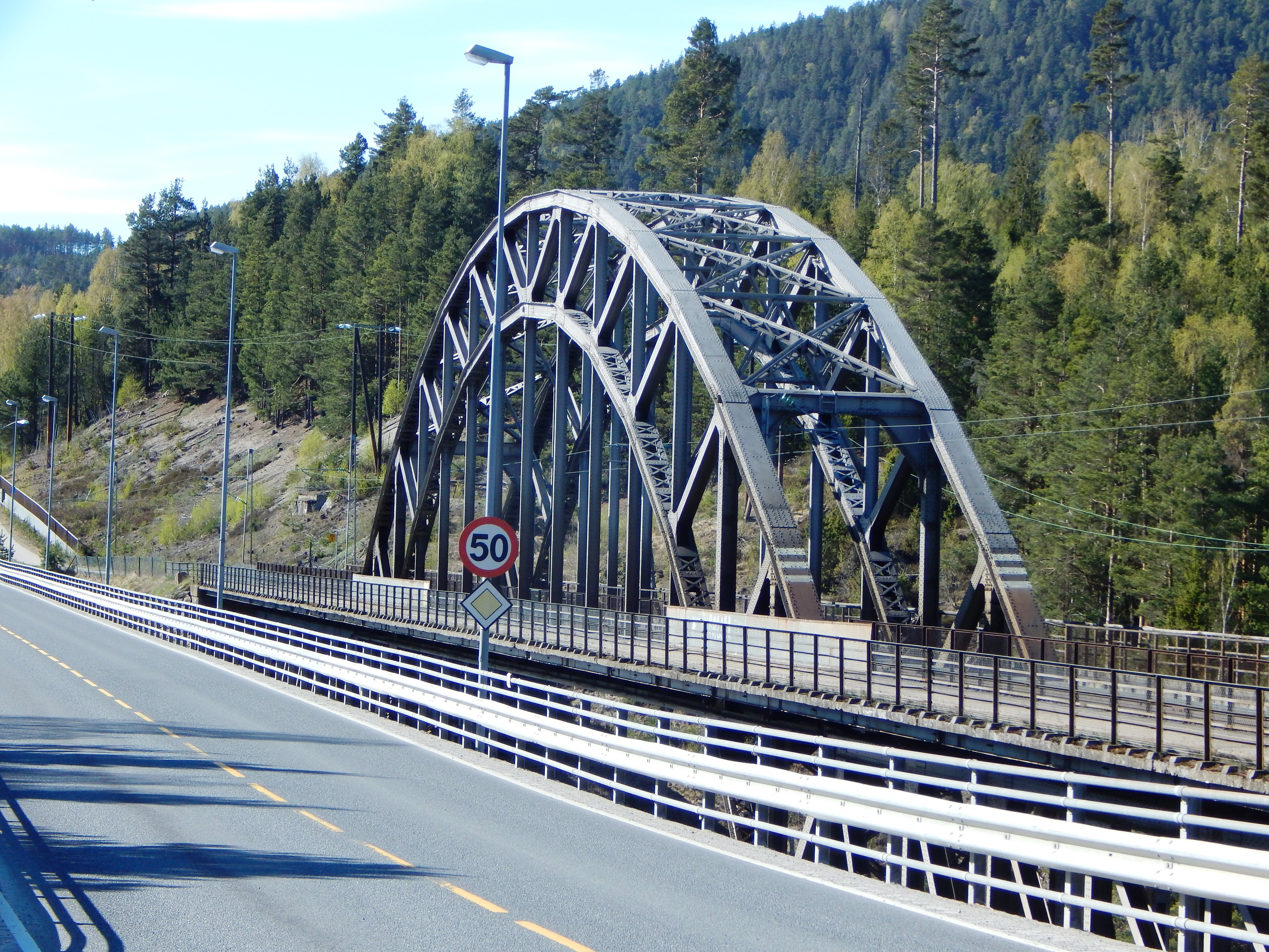 Akkerhaugen bru med fylkesvei 553 samt jernbanebro